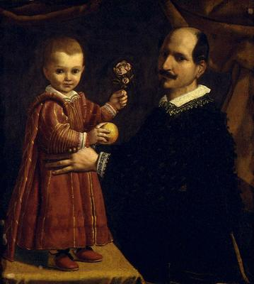 Hombre con niño, Auckland Art Gallery